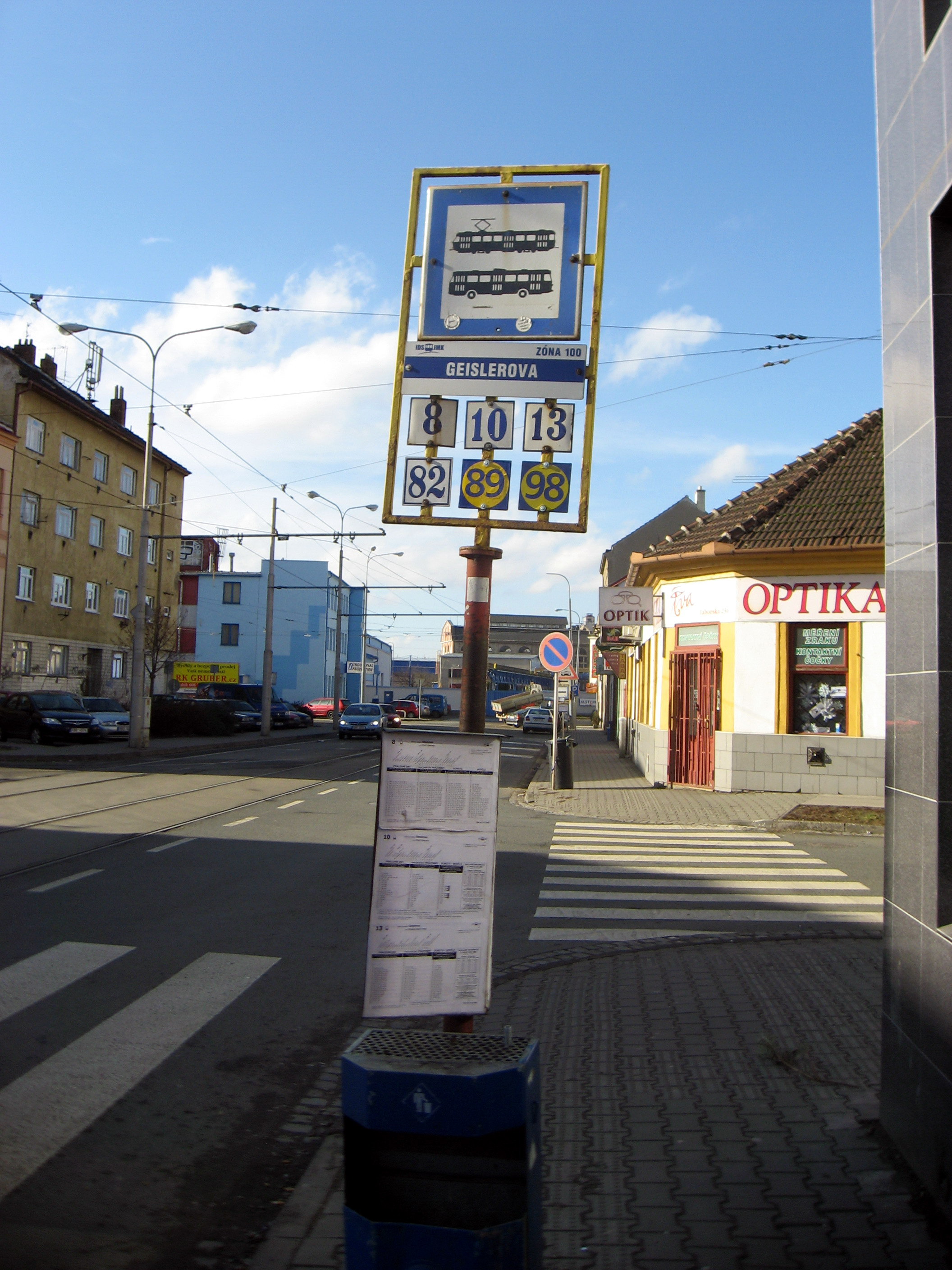 zastávka Geislerova